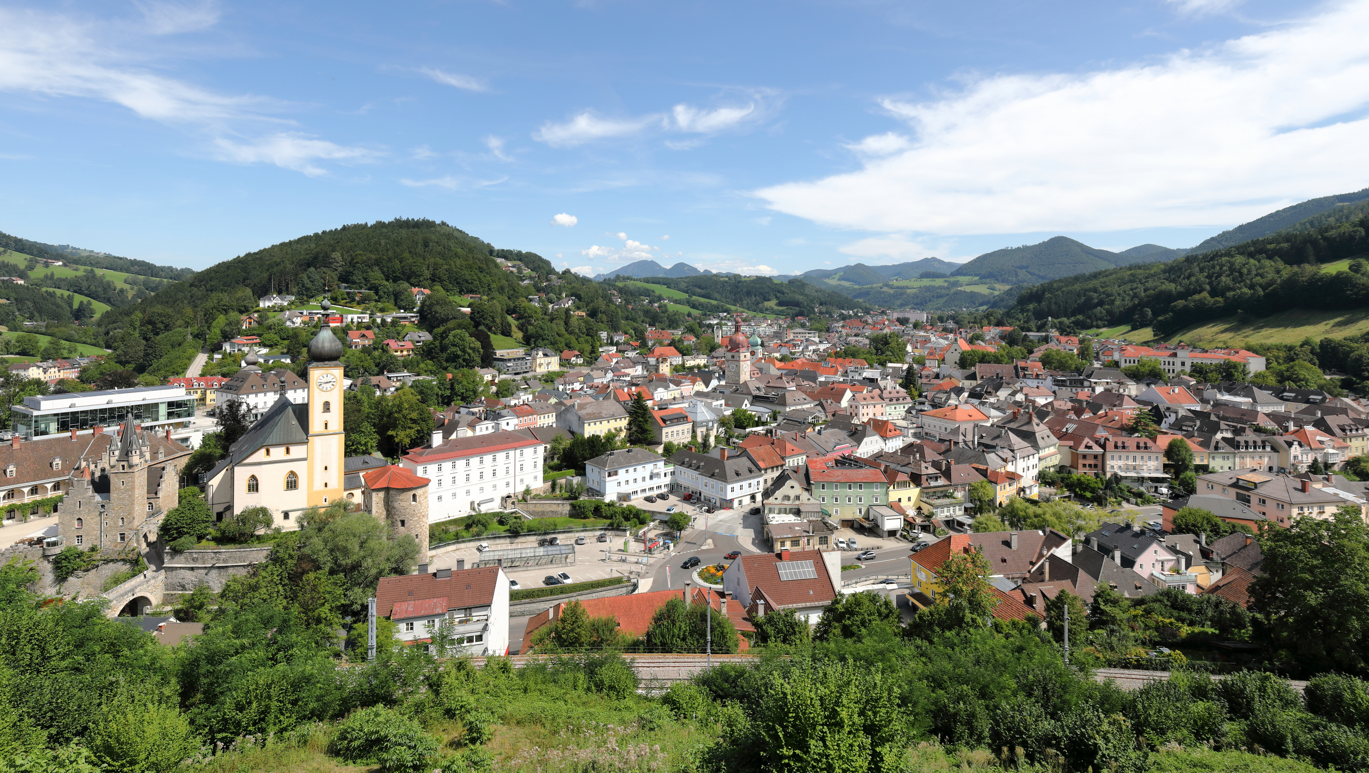 Westnordwestansicht der niederösterreichischen Stadtgemeinde Waidhofen an der Ybbs. Ganz links teilweise das Rothschildschloss, dann die Stadtpfarrkirche hll. Maria Magdalena und Lambert und in der Bildmitte der Stadtturm.